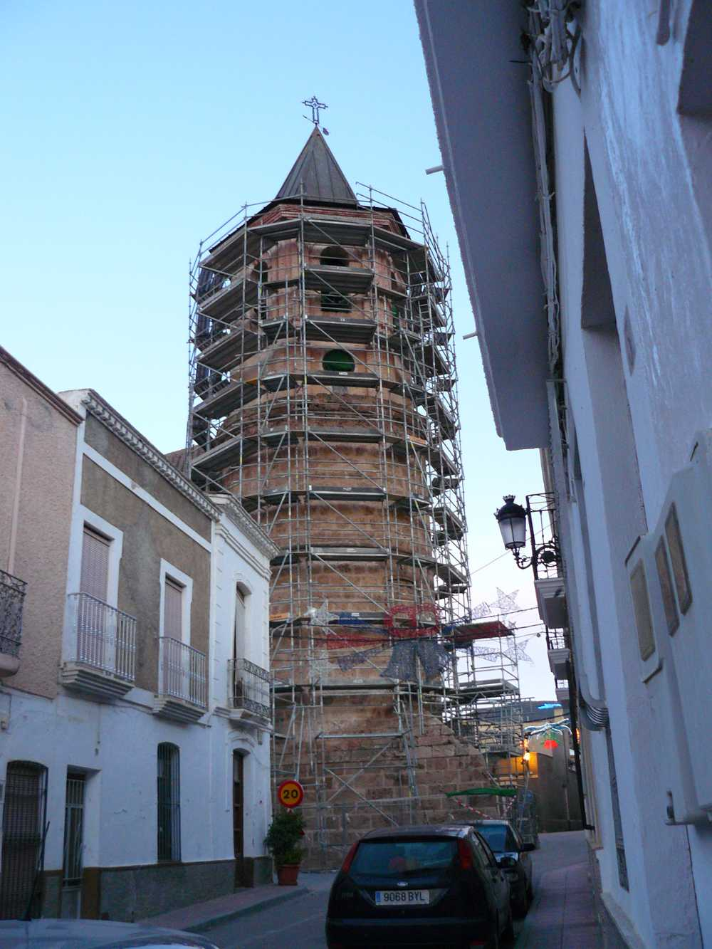 Restauración del convento de los Agustinos de Huécija (Almería-España)